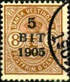 Briefmarke von Dänisch-Westindien 1905